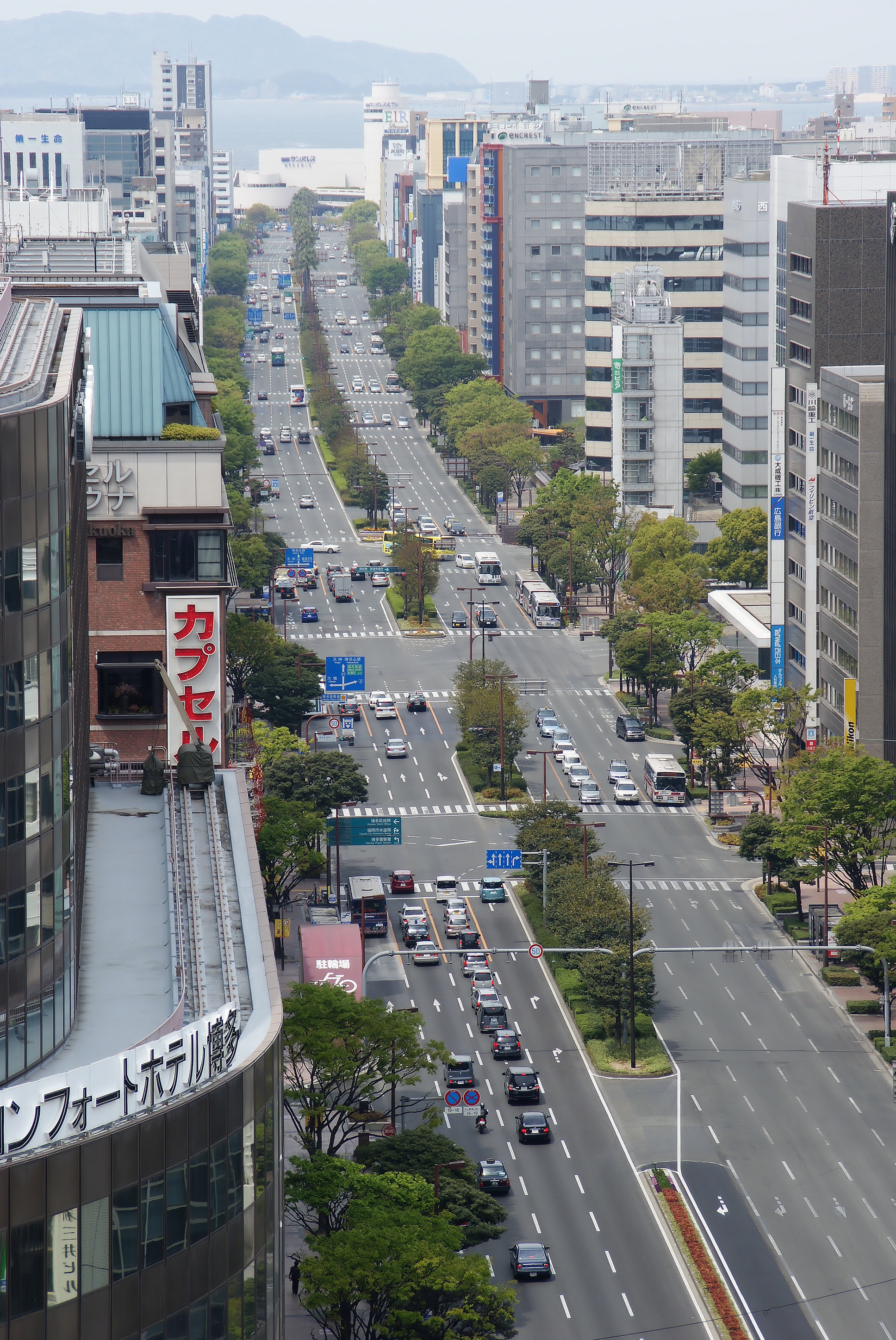 Taihaku-dori Avenue.(Hakata Ward, Fukuoka City, Fukuoka Prefecture, Japan)